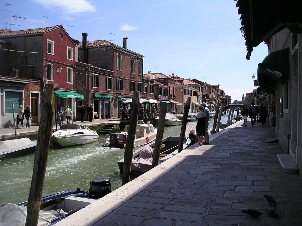 Canale, Murano, ItaliaMurano